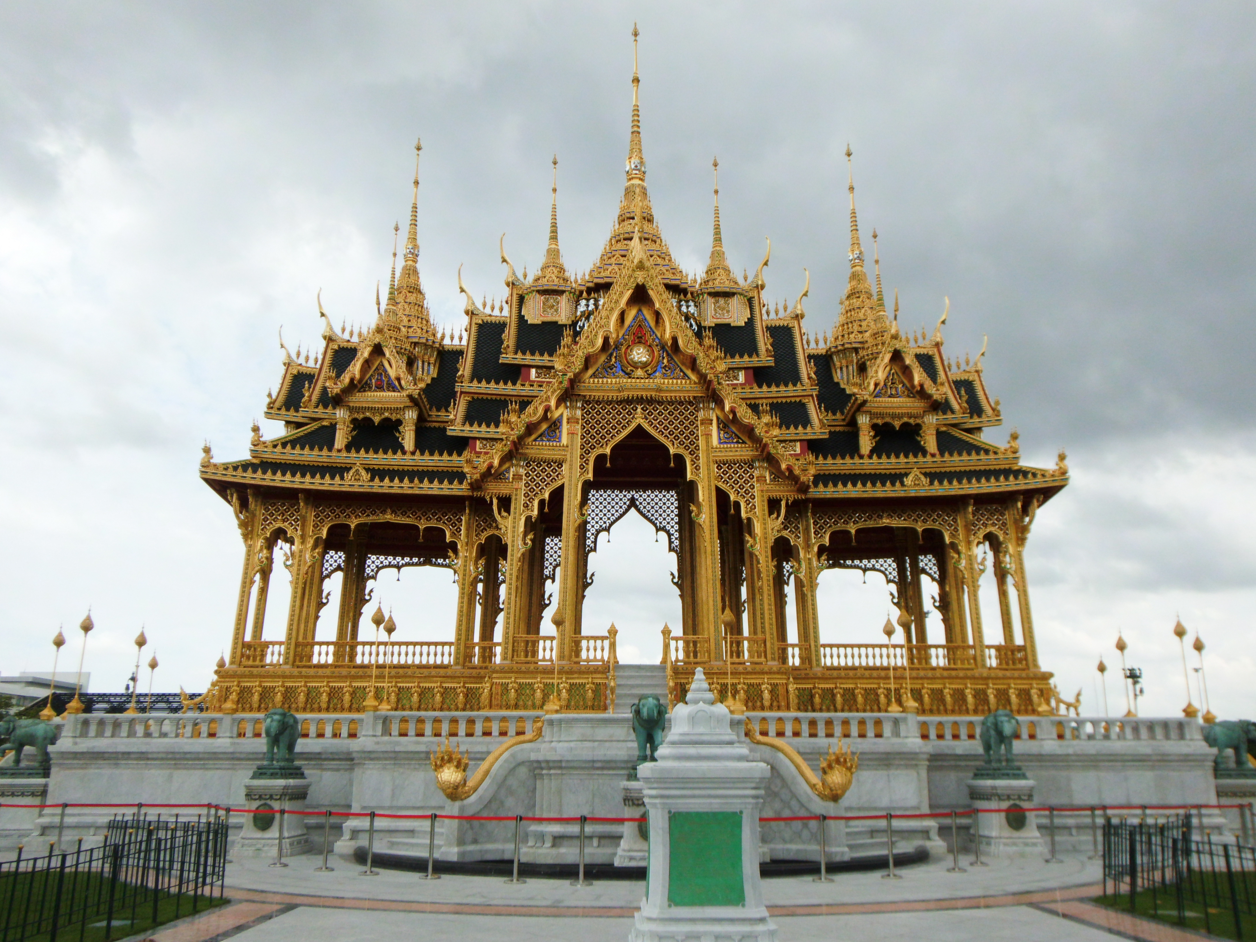 พระที่นั่งอนันตสมาคม